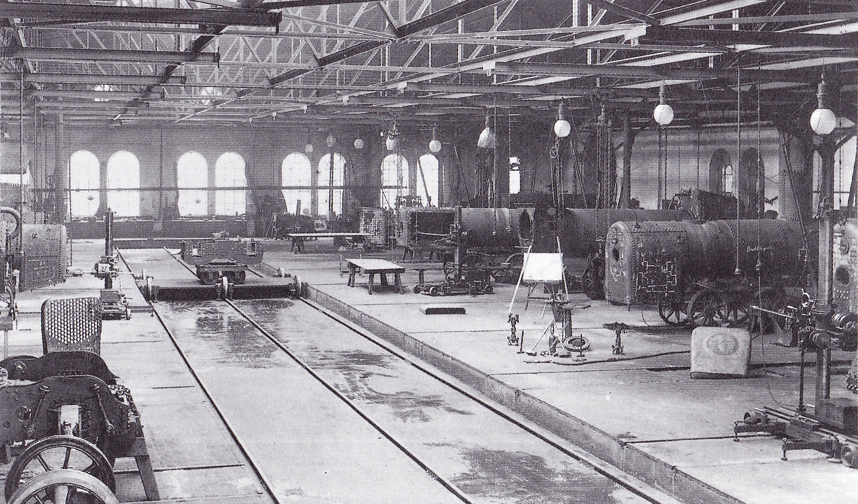 Kesselschmiede von 1877 in der Centralwerkstätte München